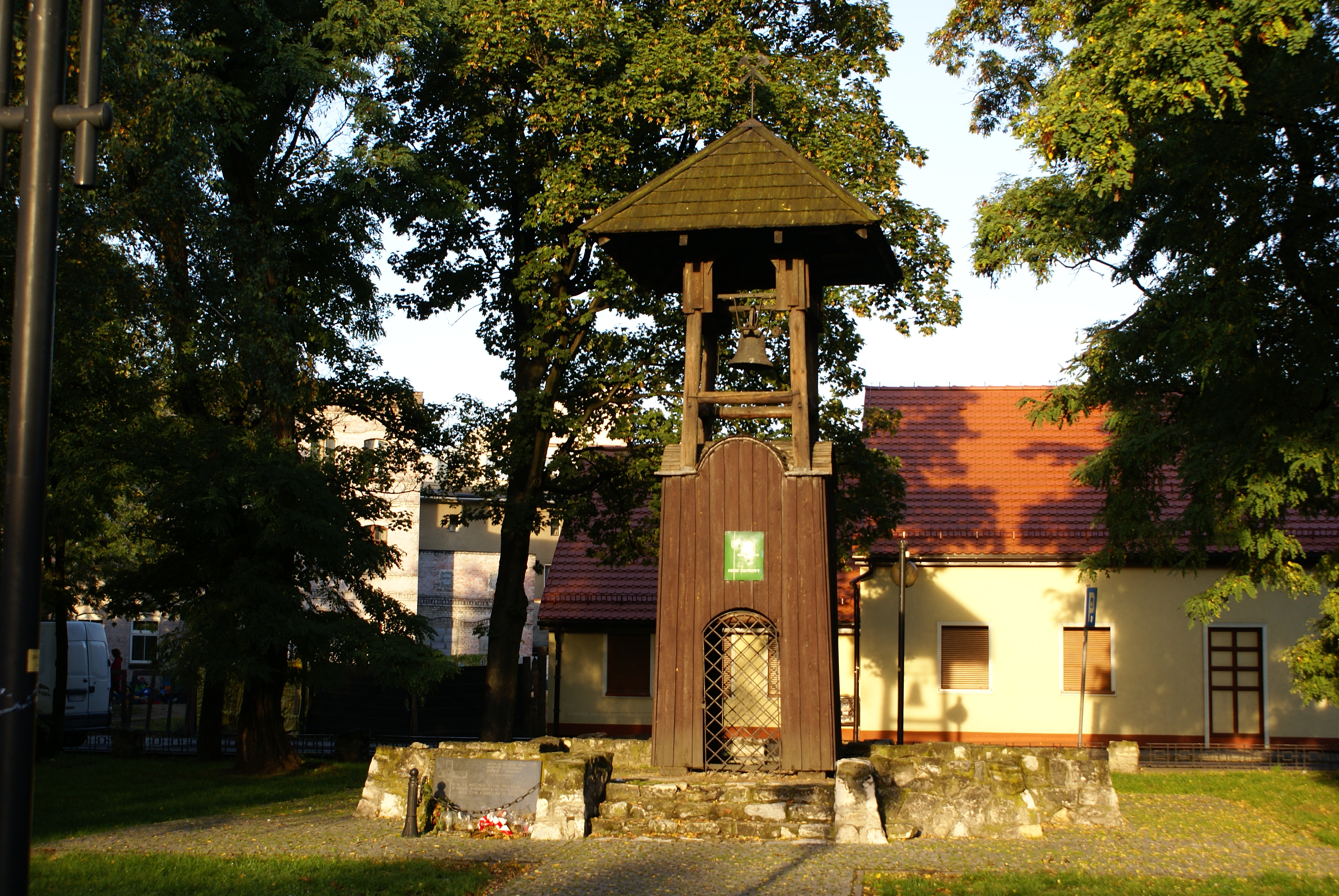 XVI-wieczna, drewniana dzwonnica w Tarnowskich Górach, przy Placu Gwarków. Gmina Tarnowskie Góry, powiat tarnogórski.